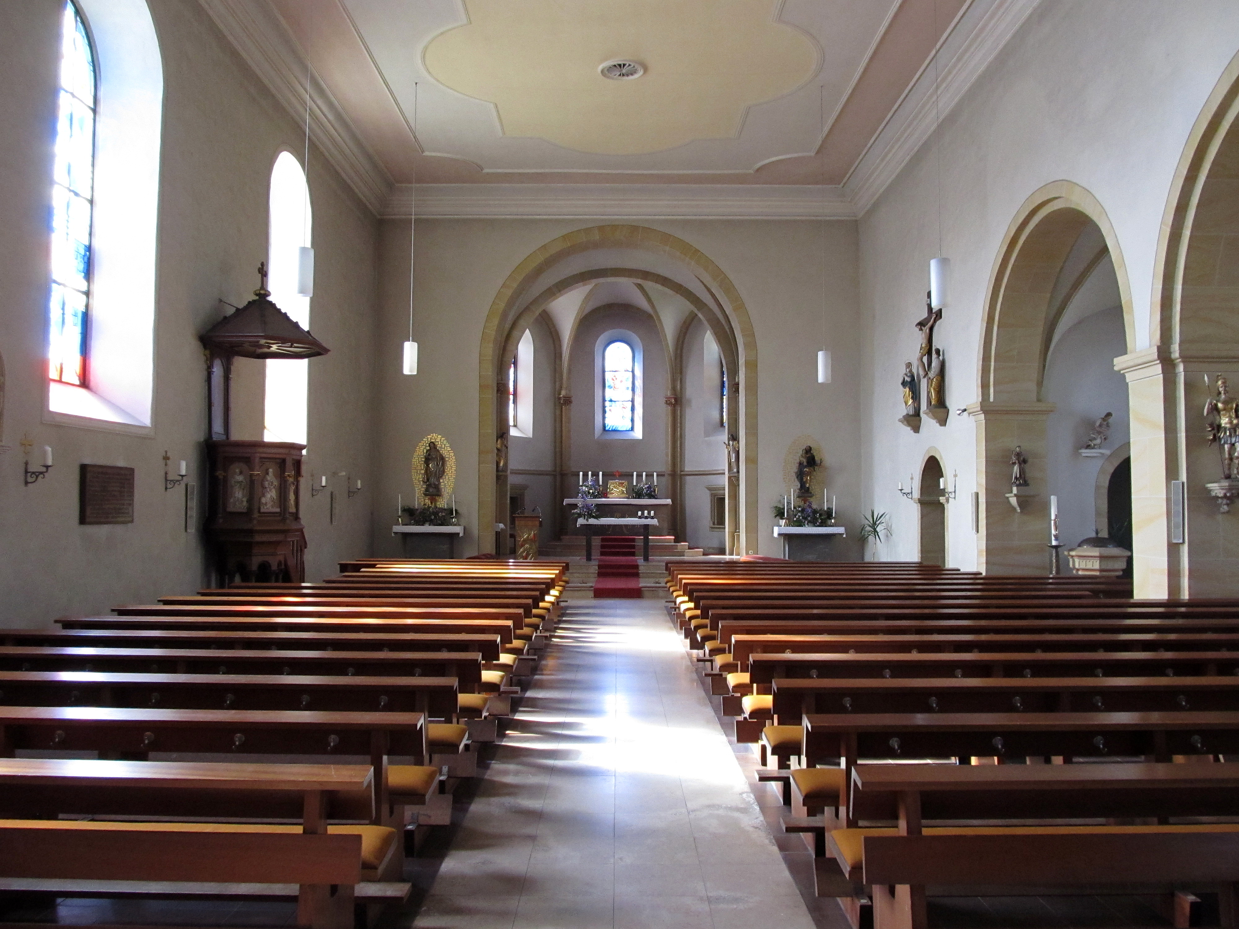 Blick ins Innere der katholischen Pfarrkirche St. Mauritius in Rubenheim, einem Ortsteil der Gemeinde Gersheim, Saarland